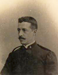 Ministro dos Negócios das Finanças do 60.º Governo da Monarquia Constitucional Portuguesa 1909